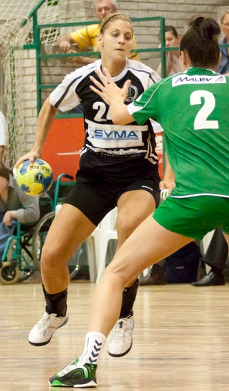 Szabina Tápai